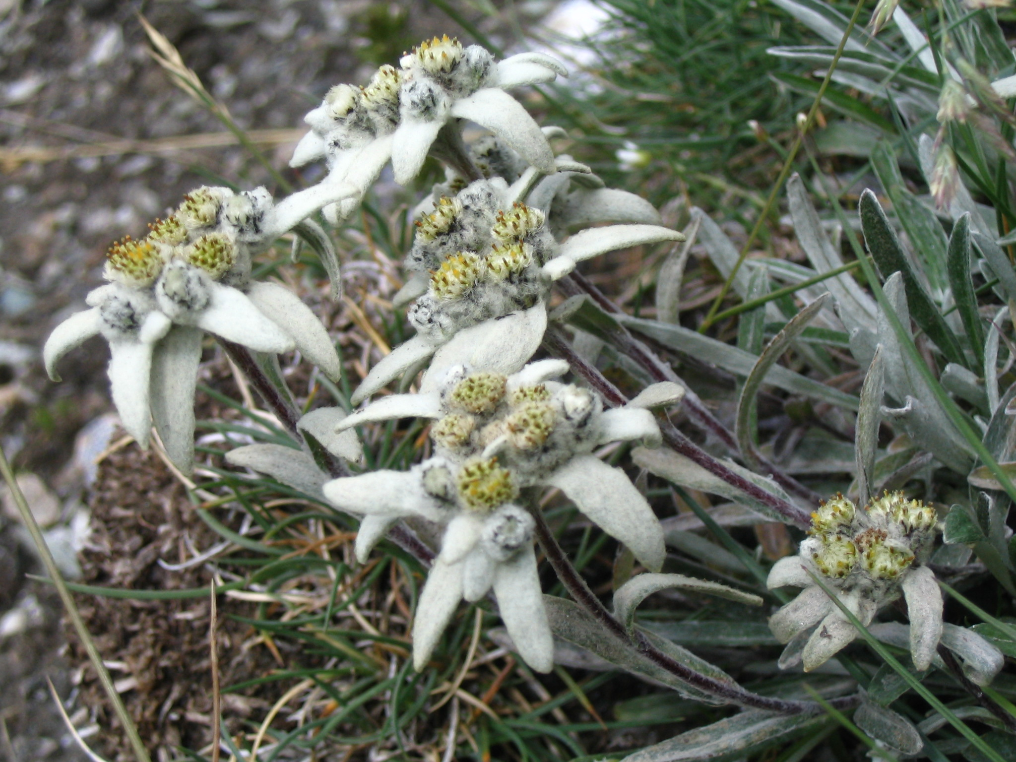 Leontopodium alpinum